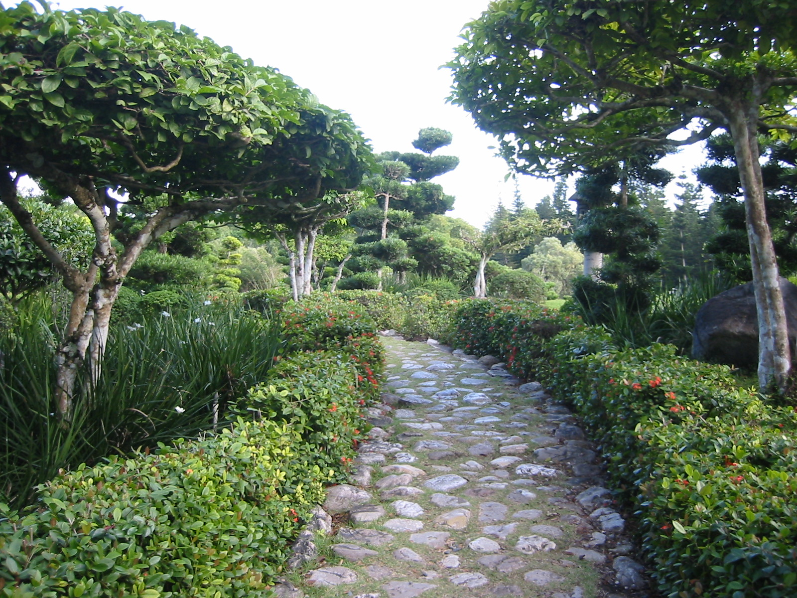 Botanischer Garten, Santo Domingo, Dominikanische Republik